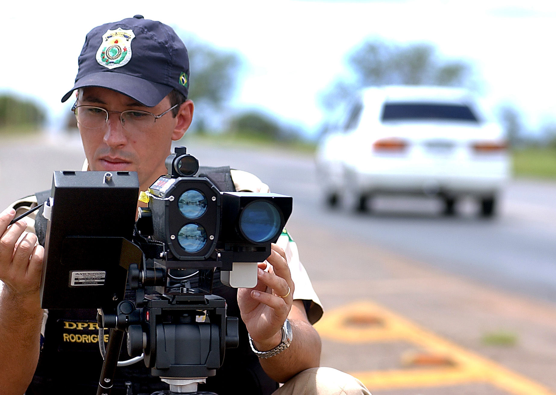 Brasília - Polícia Rodoviária Federal usa novo radar infravermelho para fiscalização das rodovias durante a terça-feira de Carnaval de 2007.